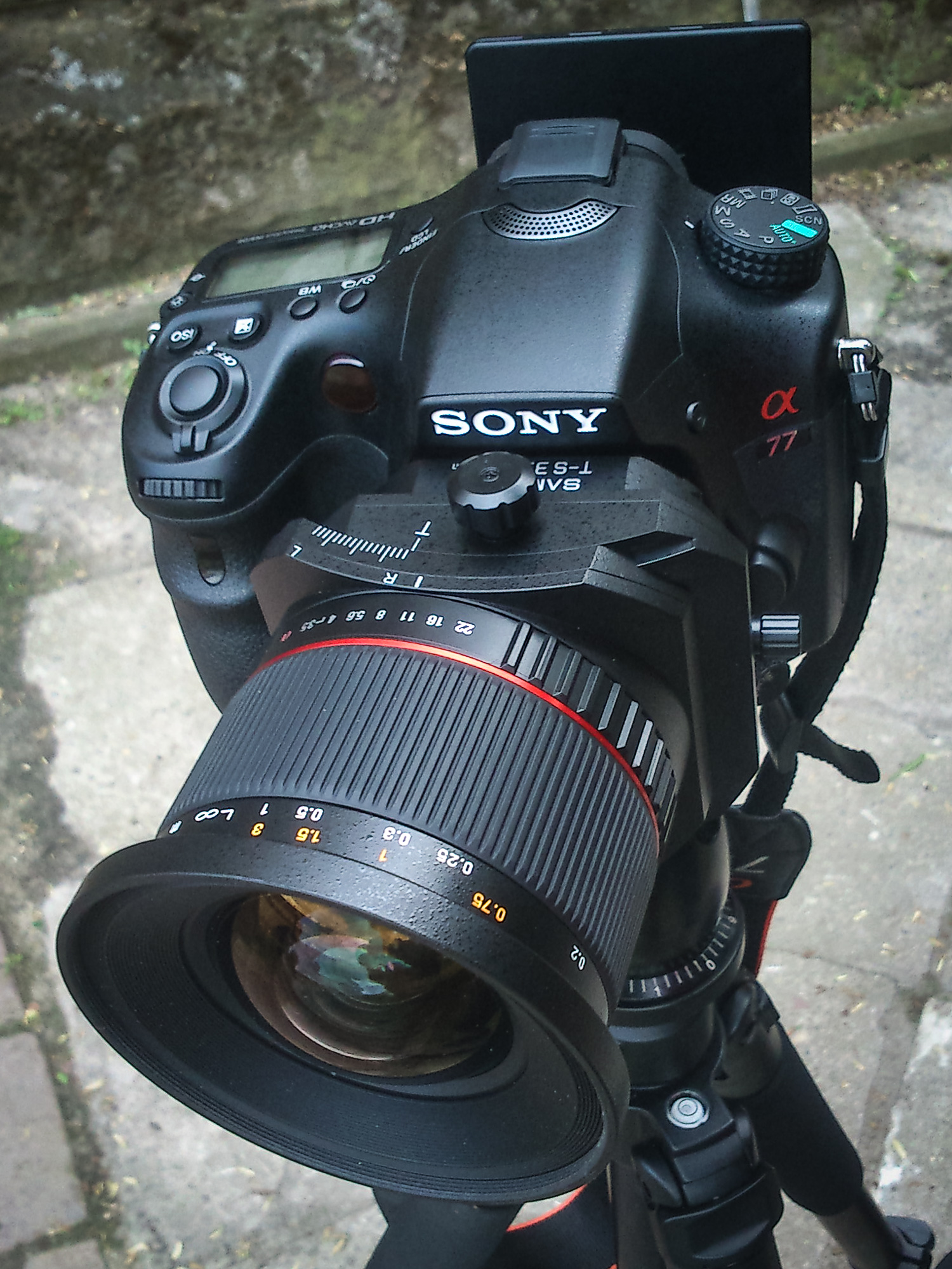 Aparat Sony A77 z obiektywem tilt-shift Samyang T-S 24mm f/3.5 ED AS UMC.